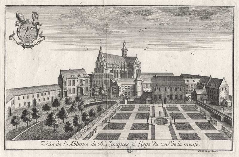 Vue de l'Abbaye de St. Jacques à Liège du côté de la Meuse, par Remacle Le Loup, 1735